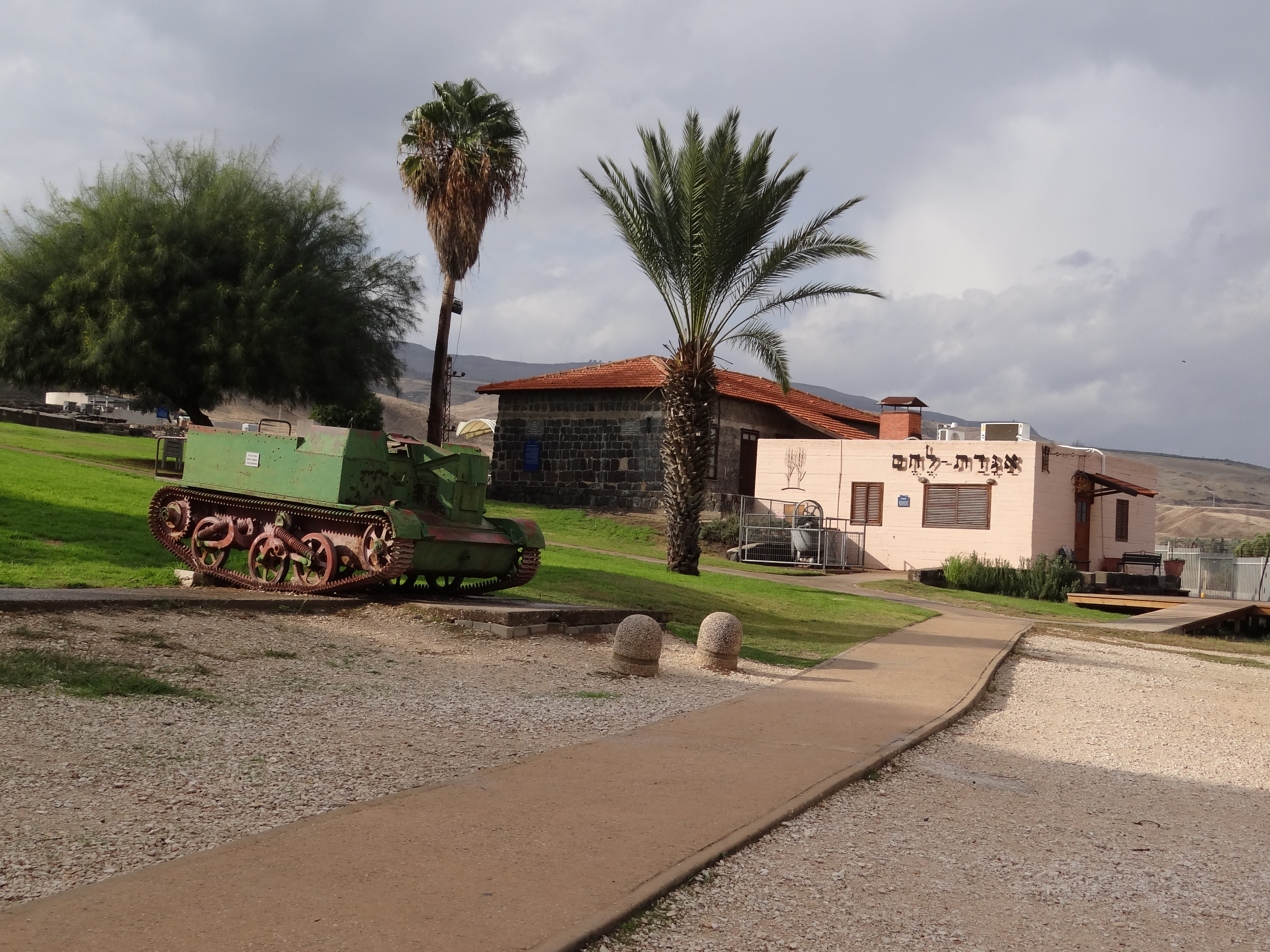 Old Gesher. In 1939 a kibbutz settle in the area. It called Gesher. The member of the kibbutz defended this palce and the police station in 1948 חצר גשר הישנה. במקום הייתה התיישבות בשנות העשרים של המאה העשרים. המתיישבים הקימו בשנת 1936 את קיבוץ אשדות יעקב. בשנת 1939 התיישבה קבוצה שהקימה את קיבות גשר. היא הגנה על המקום במלחמת העצמאות. היישוב הותקף על ידי בצבא העירקי נהרס אבל לא נכבש.